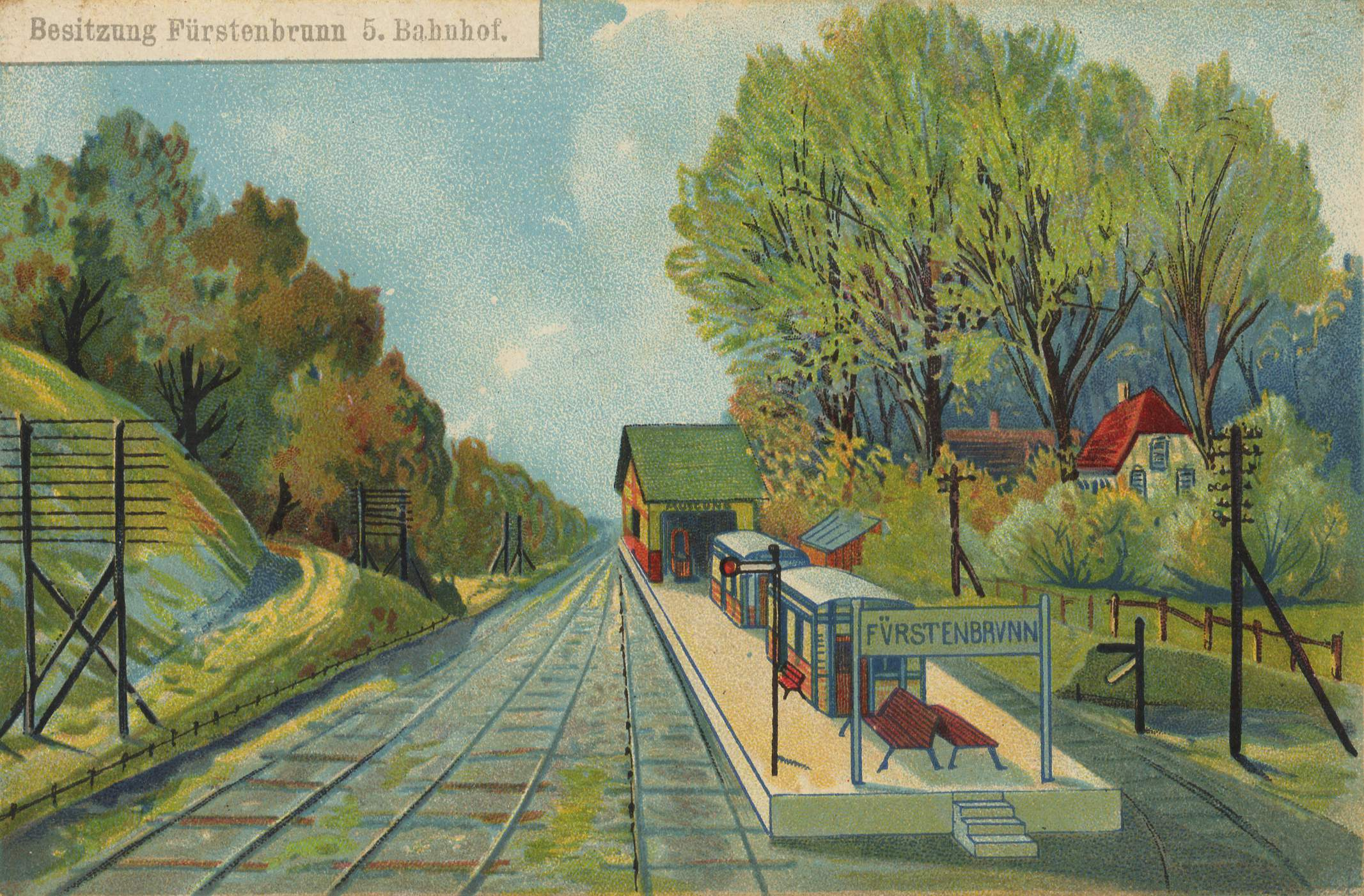 Bahnhof Fürstenbrunn an der Berlin-Lehrter Eisenbahn, später S-Bahnhof Siemensstadt-Fürstenbrunn, in Berlin-Westend. Der Bahnhof wurde 1980 geschlossen und später abgerissen.